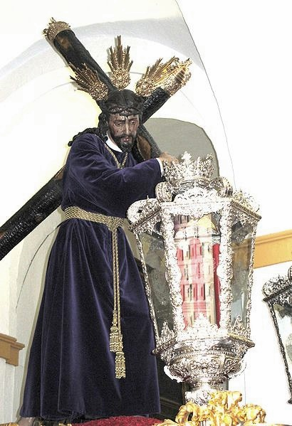 Nuestro Padre Jesús del Gran Poder de Camas (Sevilla)